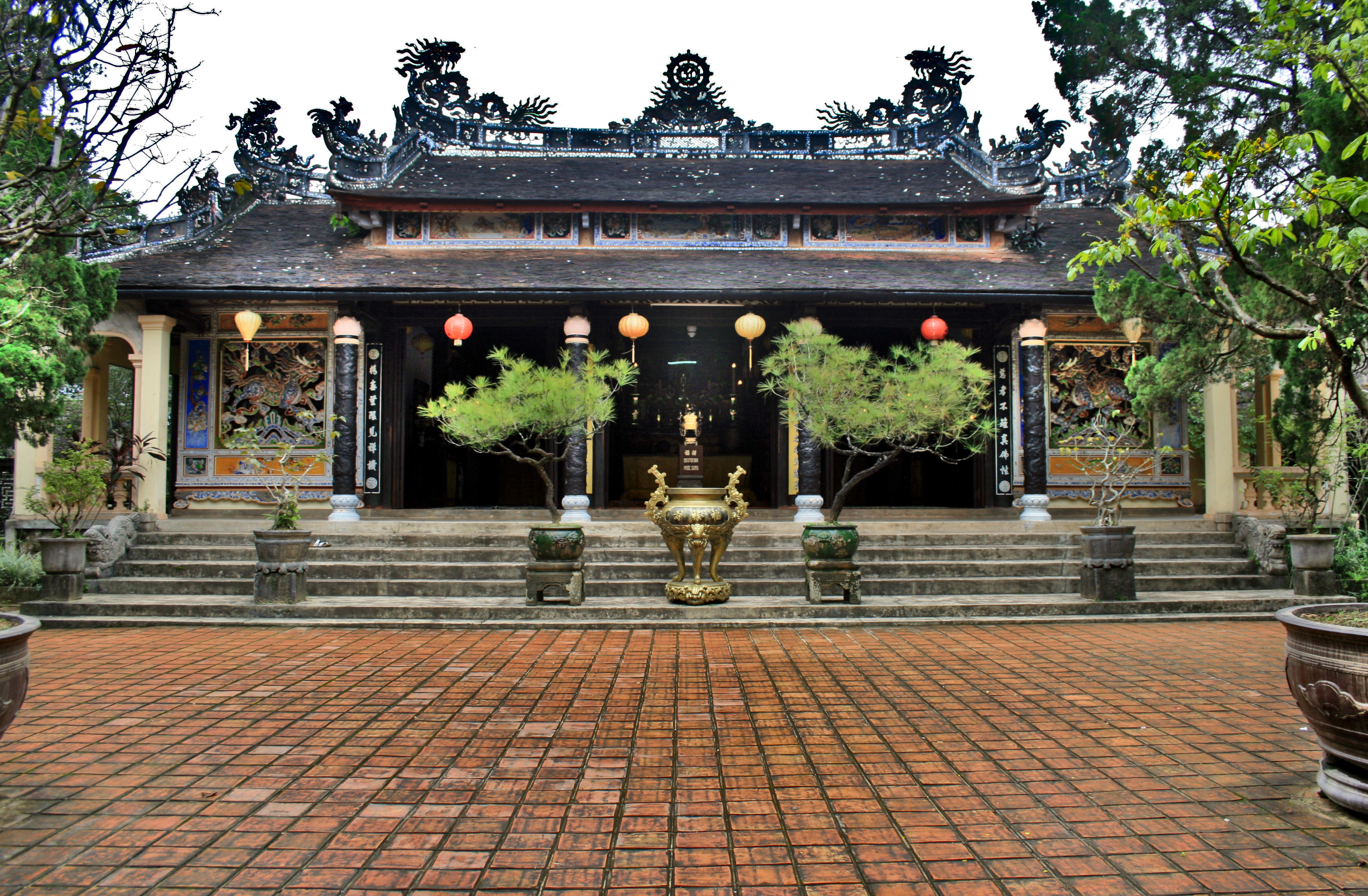 Tu Hieu Pagoda, Hue, Viet Nam